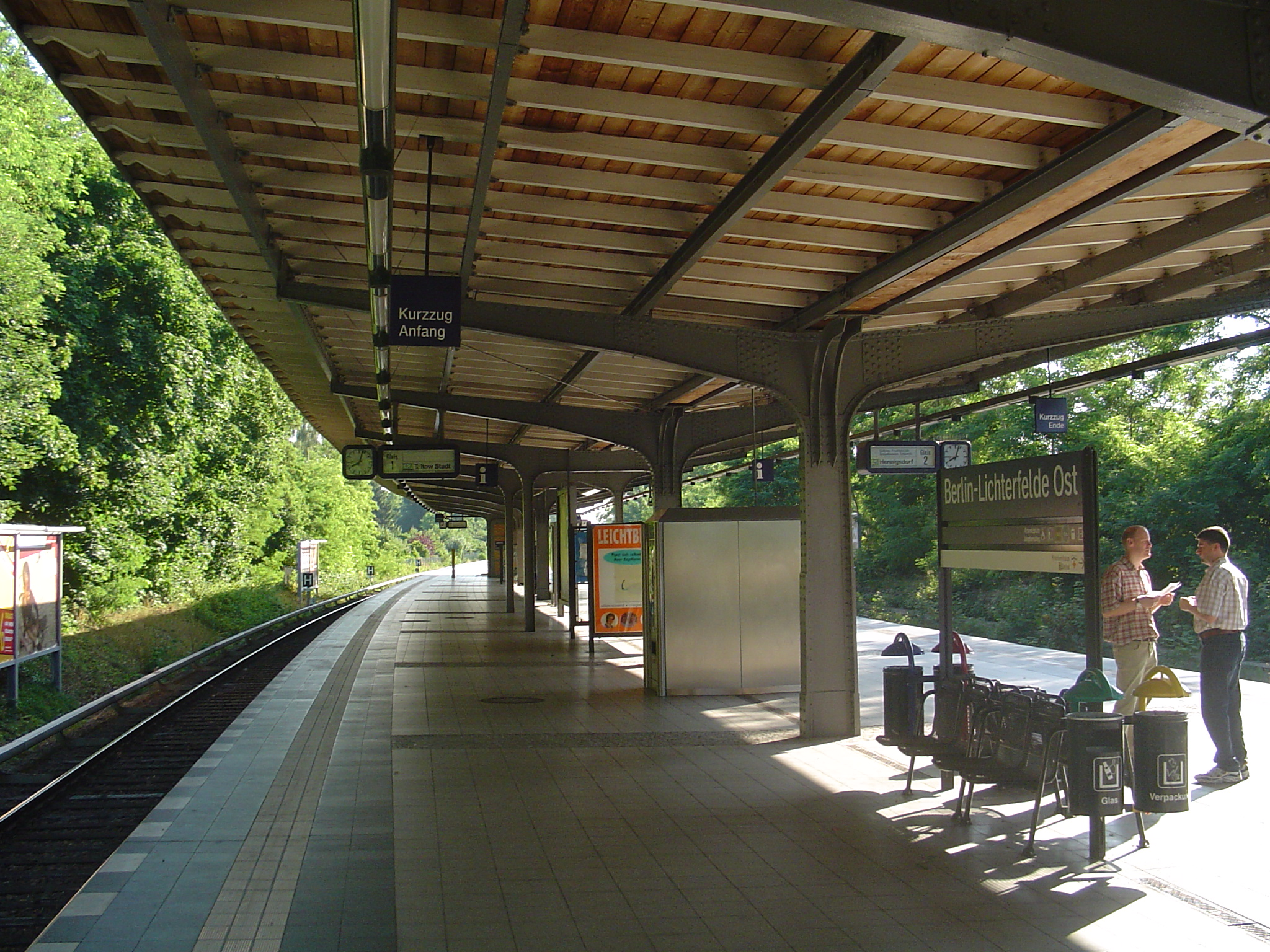 Bahnsteigdach des S-Bahnhofs Lichterfelde-Ost, Aufnahme von SO